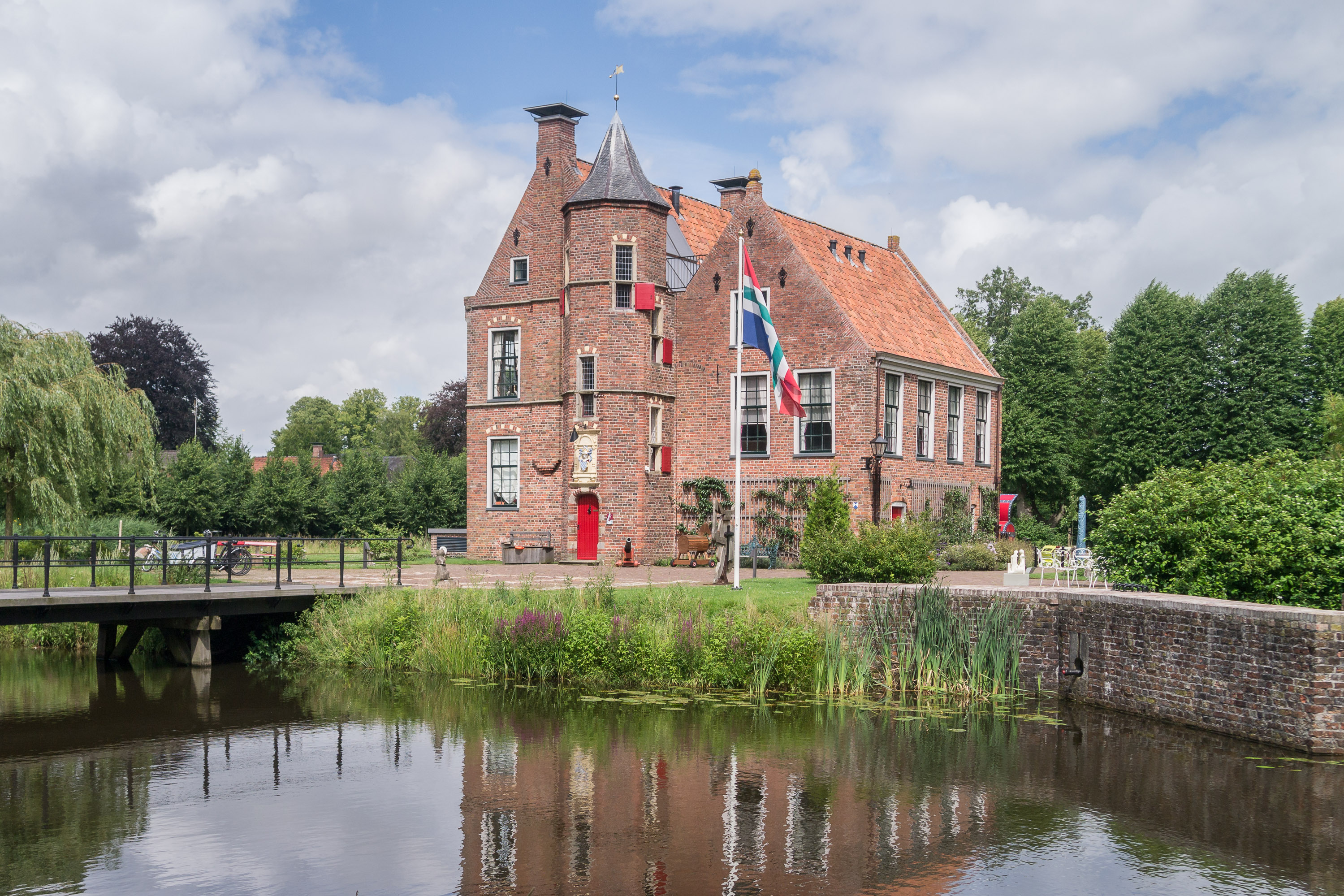 Wedderborg Zuidwest zijde